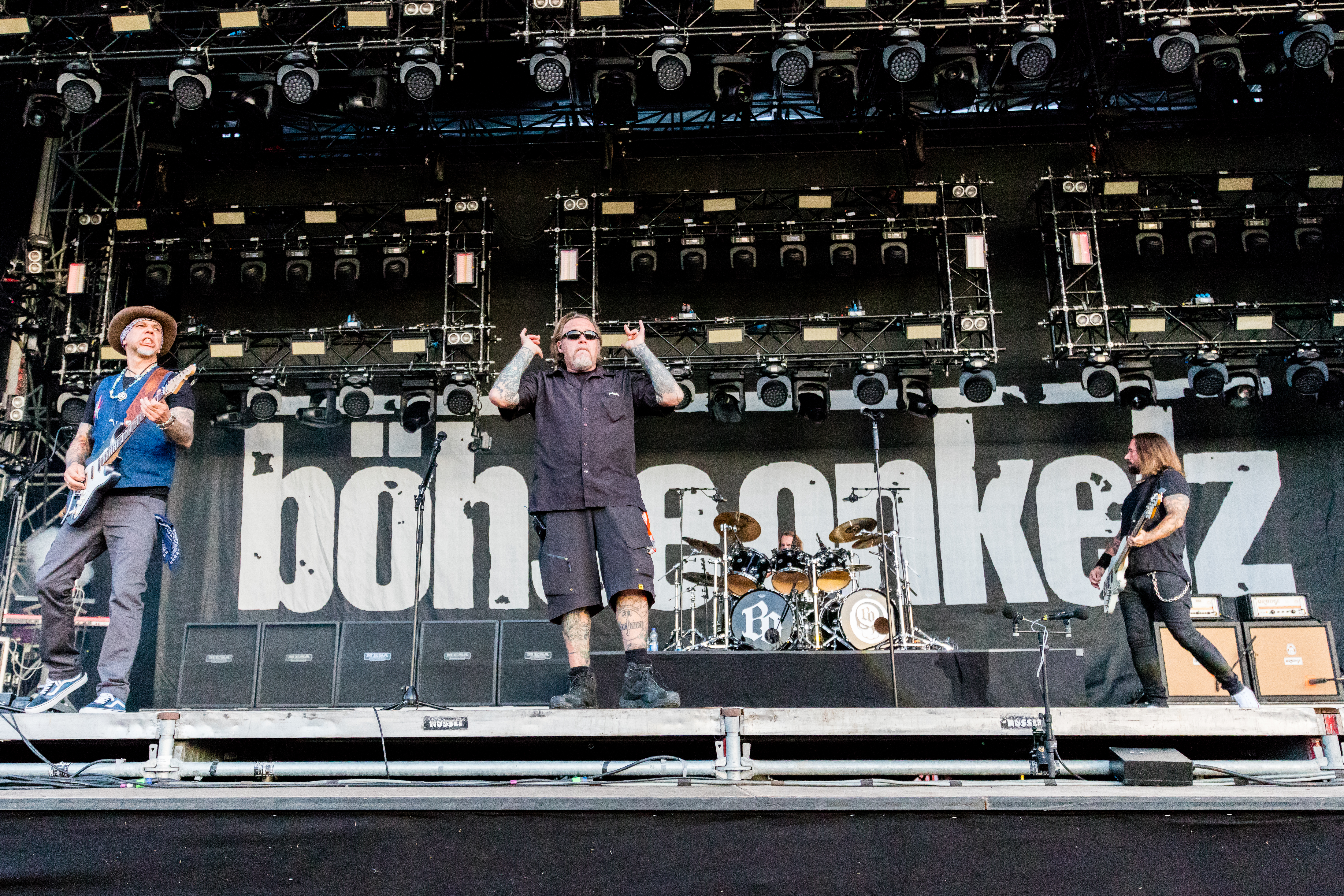 Böhse Onkelz @ Rock the Ring 2018